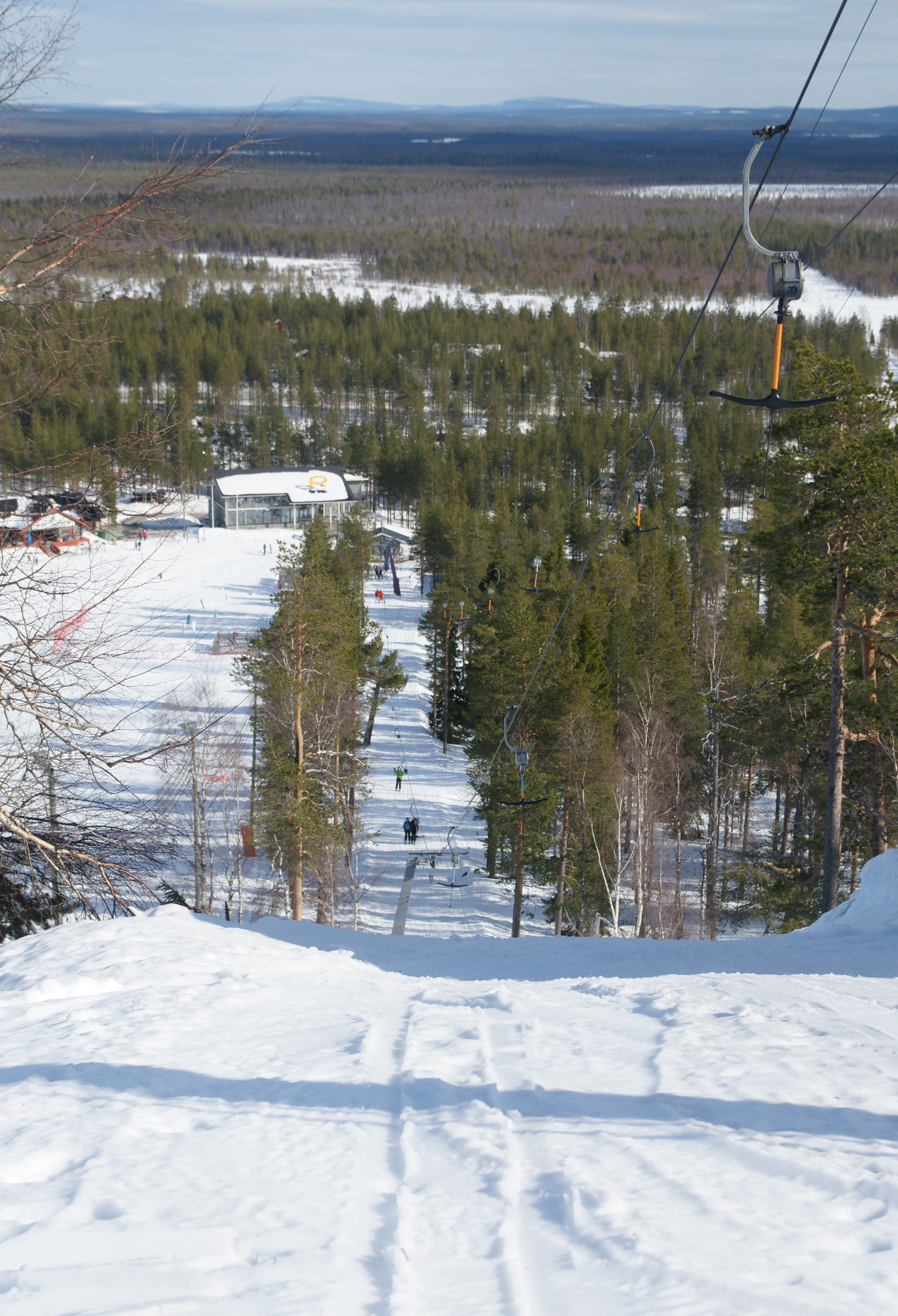 Näkymä Pyhätunturilta.